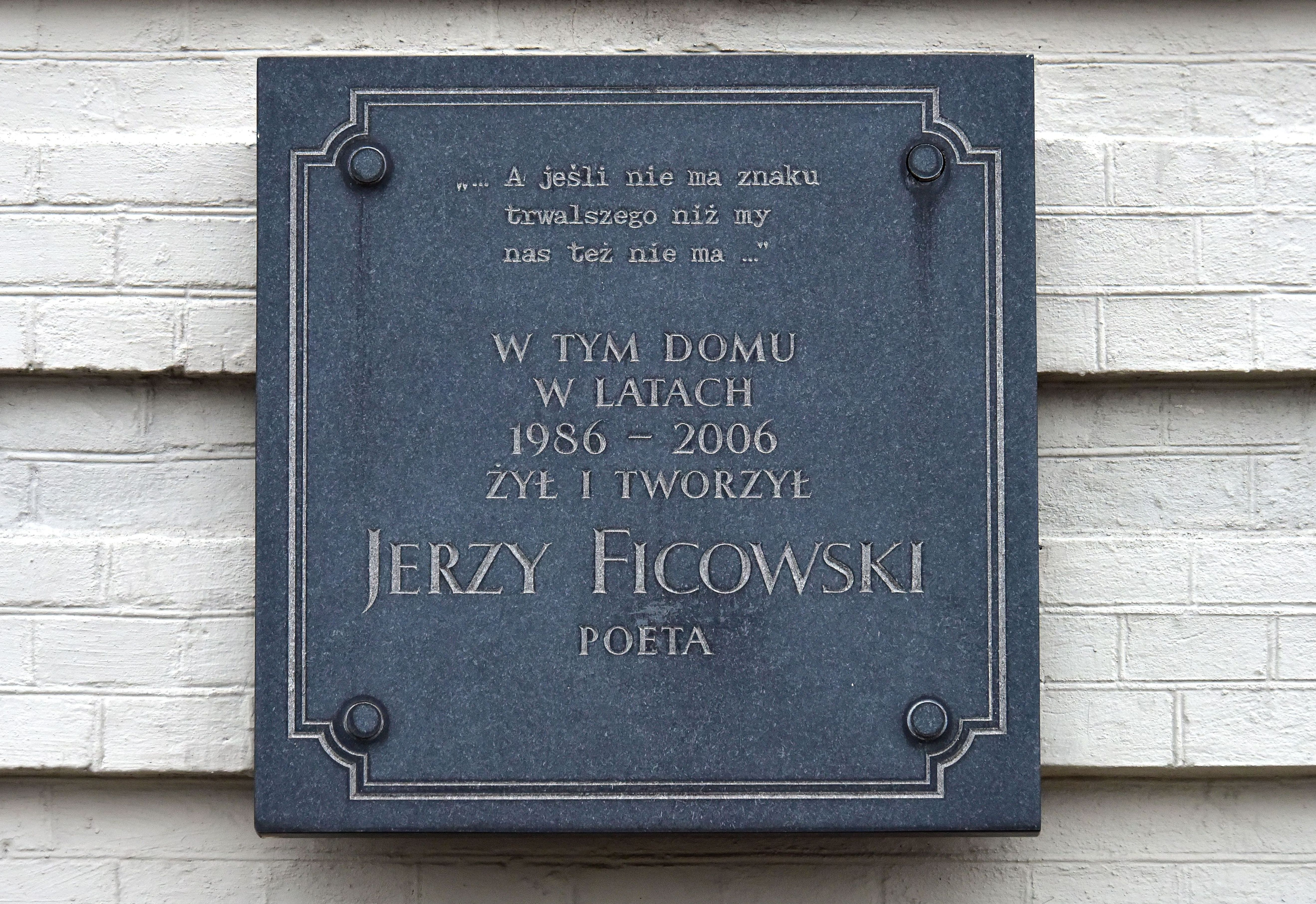 Tablica upamiętniająca Jerzego Ficowskiego przy placu inwalidów 4/6/8 w Warszawie